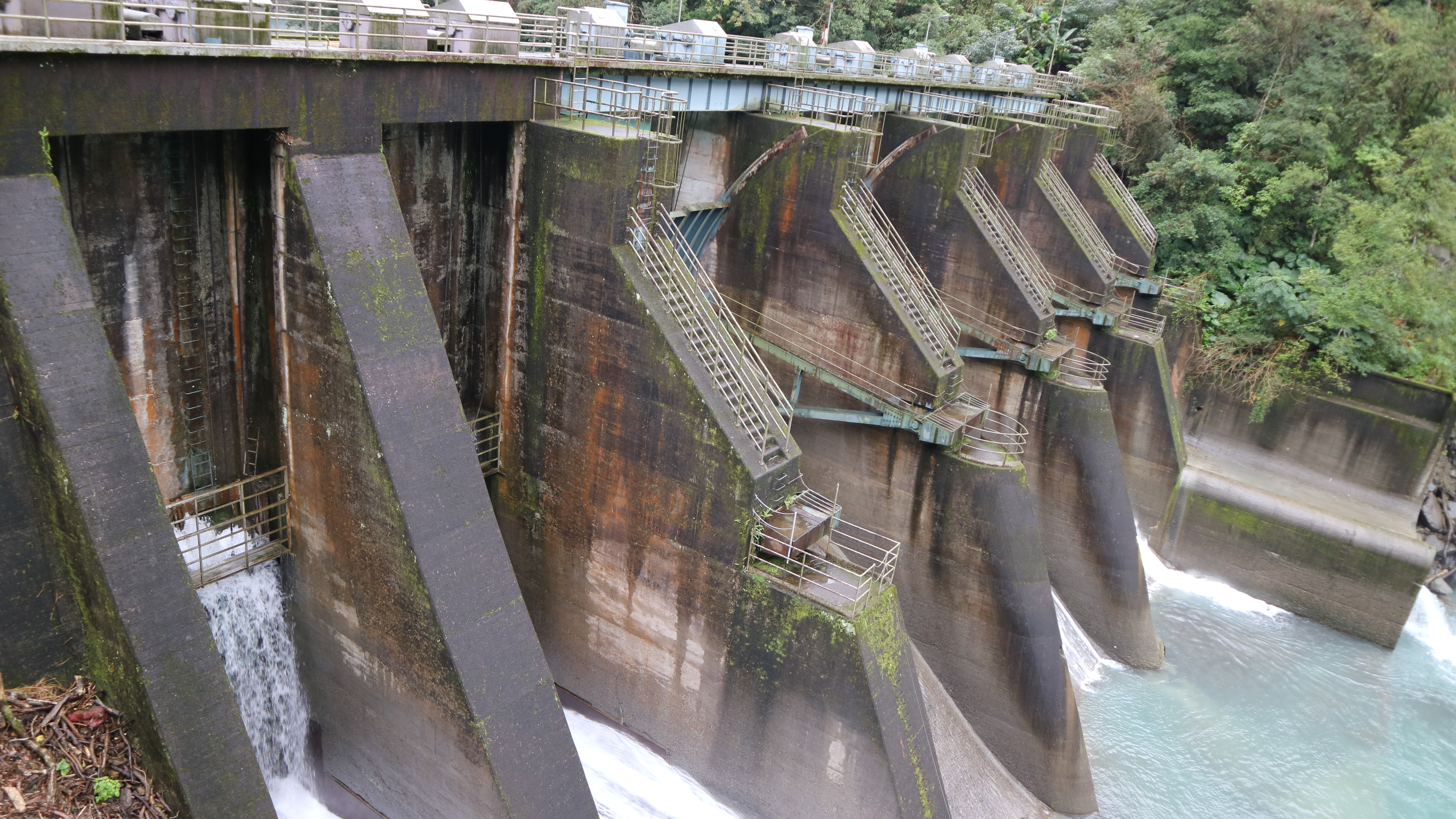 新北市烏來區臺灣電力公司桂山發電廠羅好壩